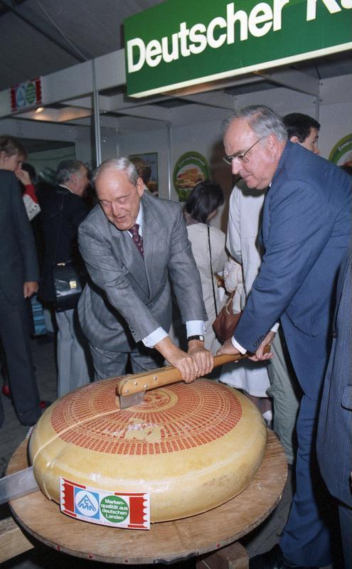 21.09.1988 Journalistenfest im Bundespresseamt